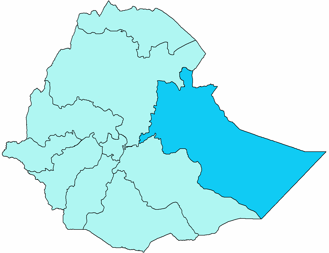 Mappa del vicariato apostolico di Harar. Fonte per i confini della diocesi: Ethiopian Catholic Church.